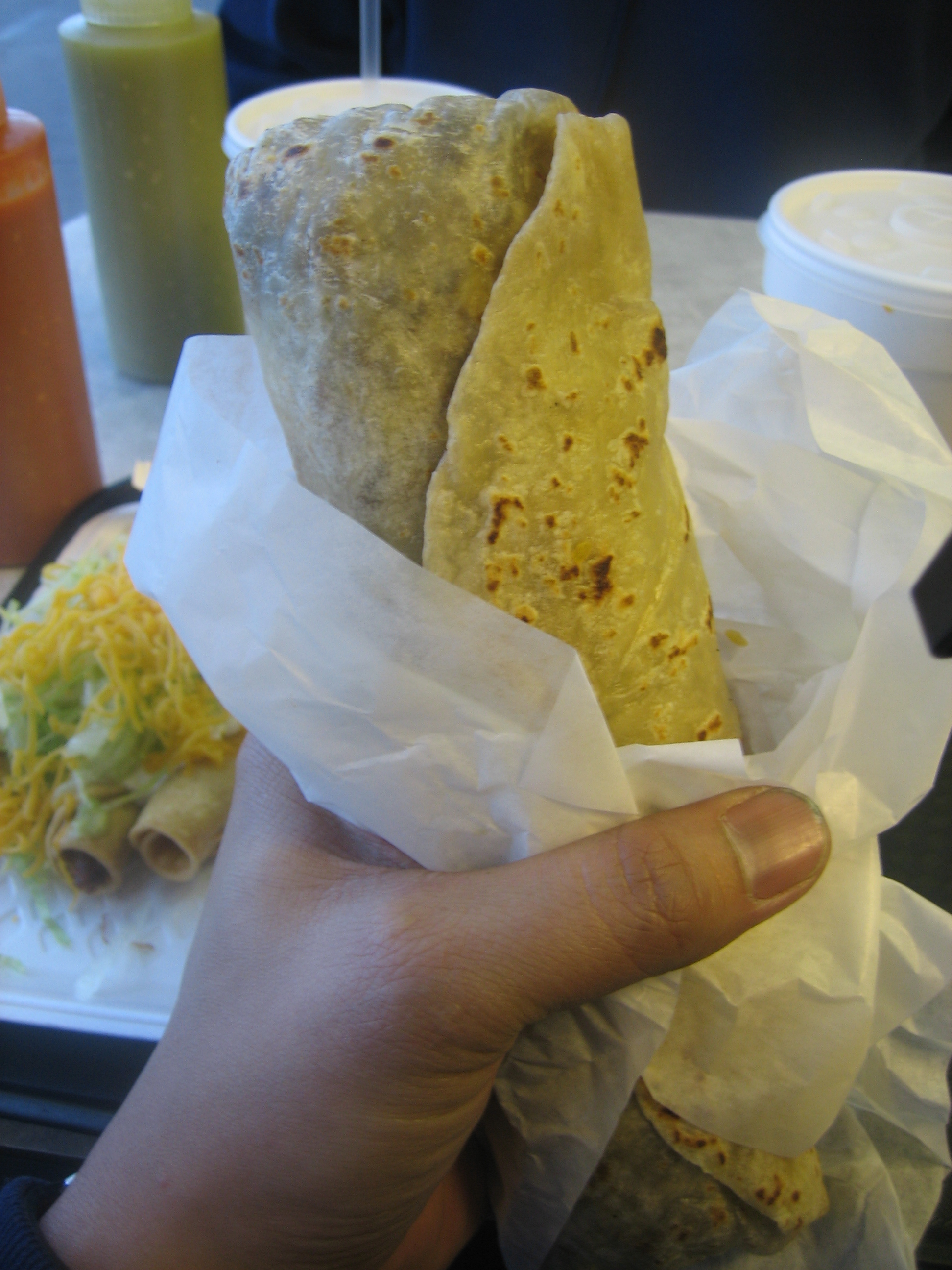 Burrito at Papa Chevo's